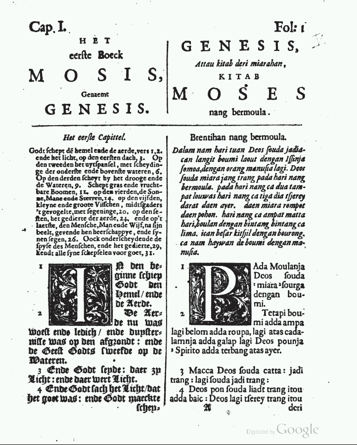 First translation of Genesis to Malay language by Brouwerius. Full book title: Het eerste Boeck Mosis, genaemt Genesis. Na de oorspronckelijcke waerheydt over-geset inde Nederduytsche ende Maleytsche tale. Ende is dit eerste Boeck Mosis inde Maleitsche tale over-gheset door Daniel Brouwerius ... Genesis, attau kitab deri miarahan, kitab Mosis nang bermoula. Bersalin dalam